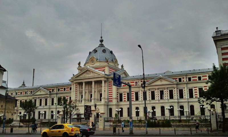 Statuia spătarului Mihail Cantacuzino